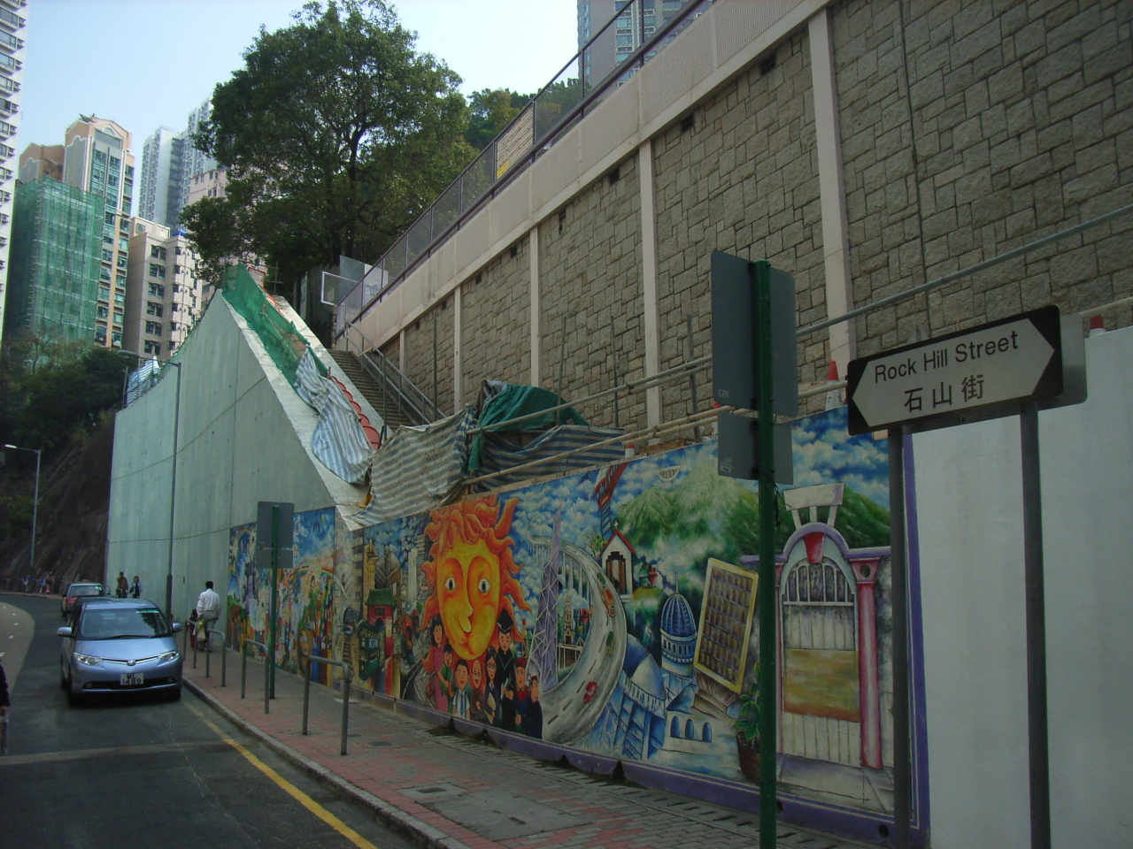 石山街 (Rock Hill Street)，是一條行車zh:街道，位處於zh:香港zh:西環zh:堅尼地城.